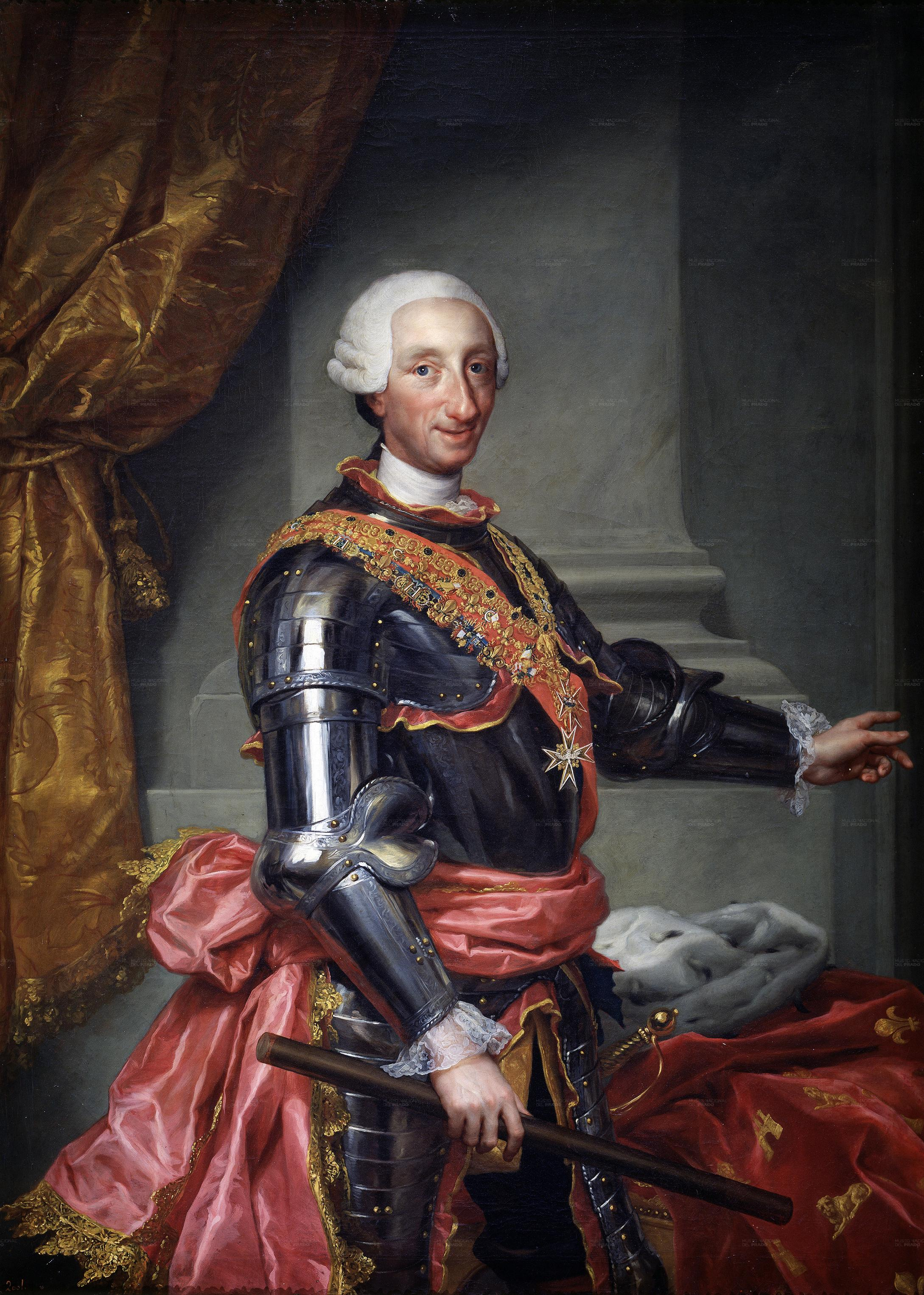 Retrato del rey Carlos III de España (1716-1788), que fue hijo del rey Felipe V de España y de su segunda esposa, la reina Isabel de Farnesio.